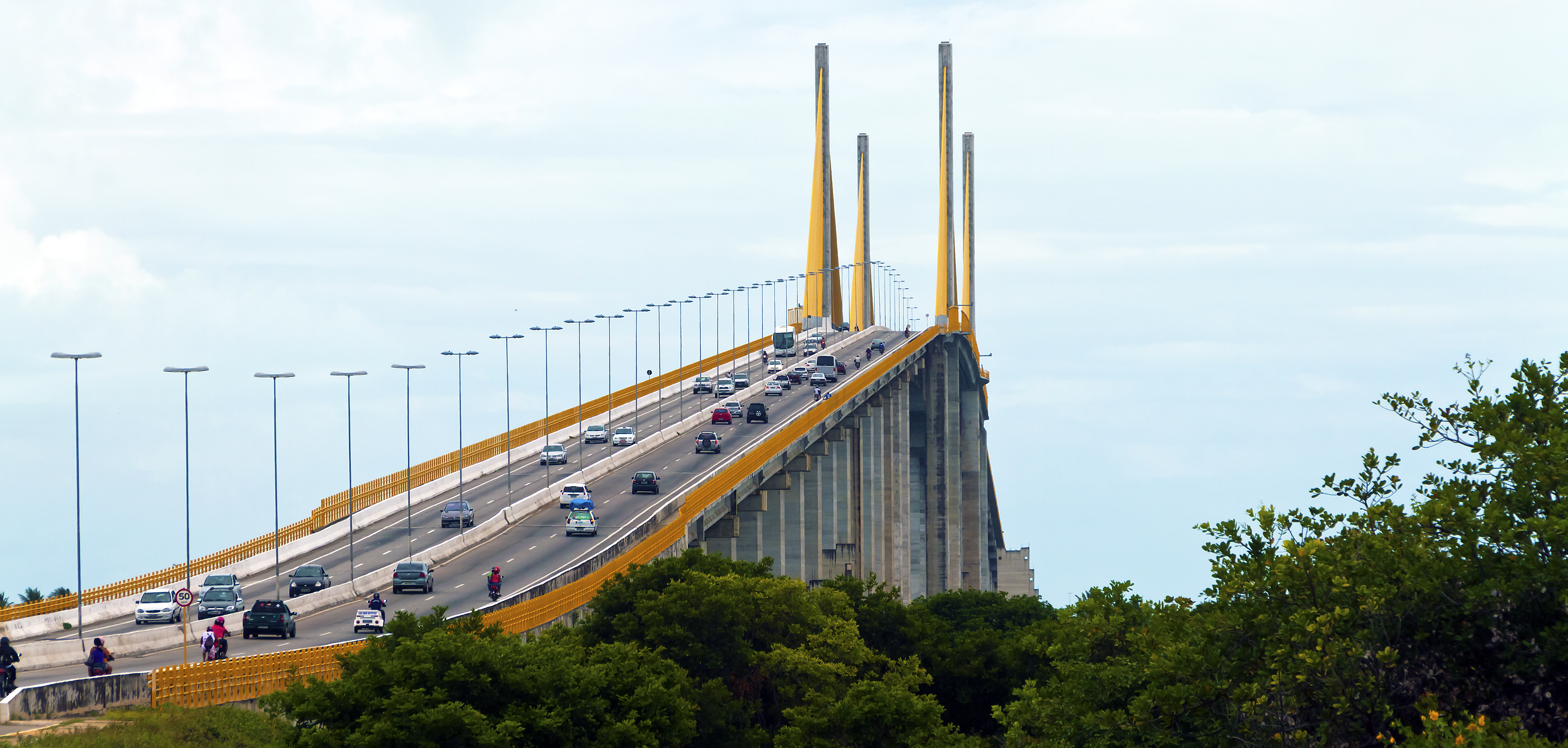 Ponte que liga Natal a Genipabu - RN